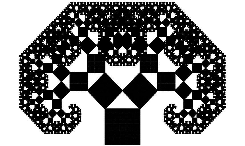 12a iteració de l'arbre de Pitàgores. Dimensió de Hausdorff-Besicovitch: 2. Generat per un IFS.